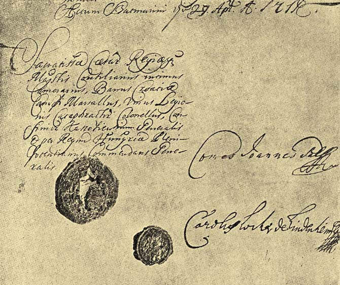 Originalurkunde des Friedens von Sathmar, unterzeichnet am 1. Mai 1711; Unterschrift des Grafen (Comes) Johann Pállfy